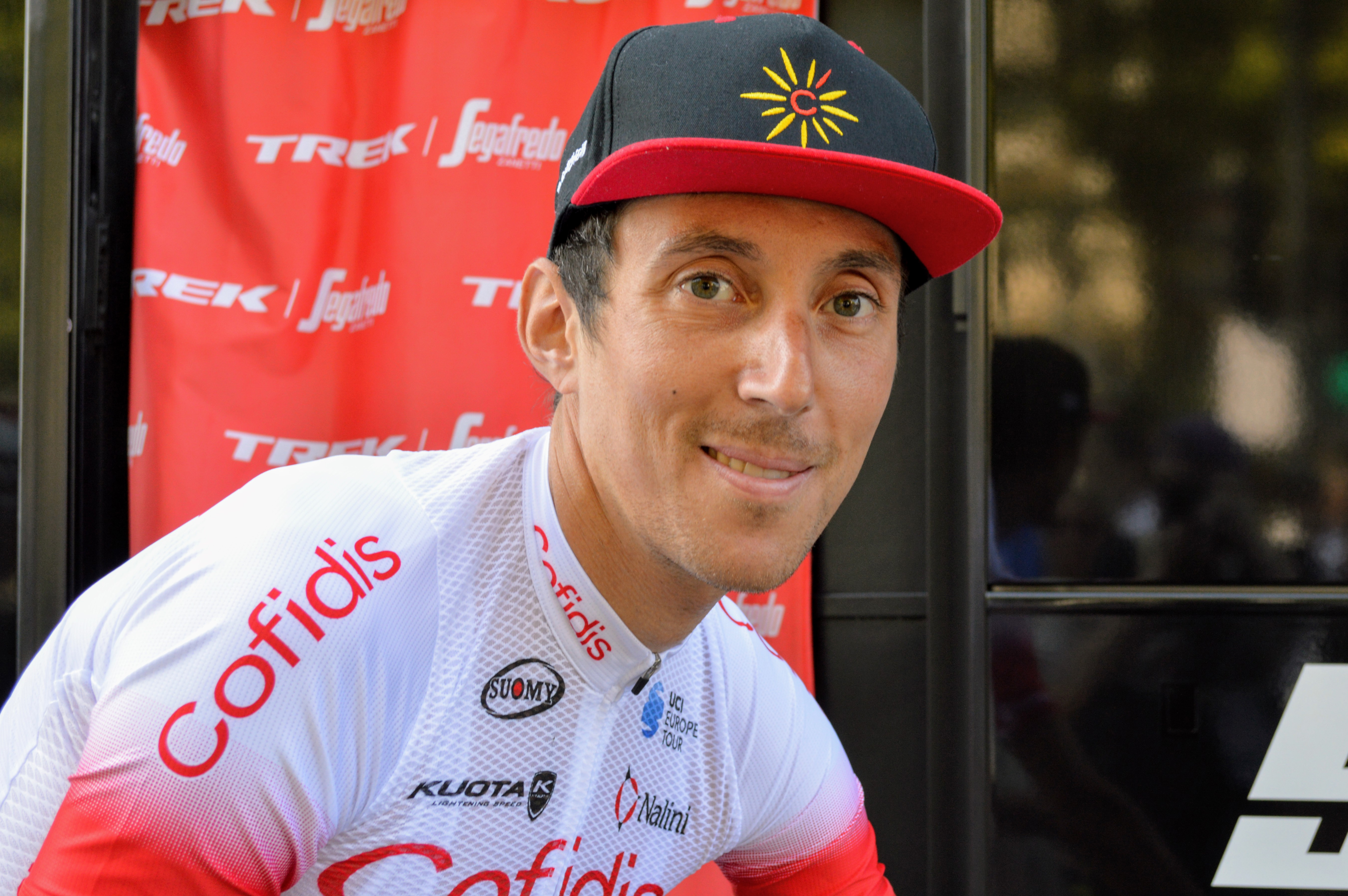 Stéphane ROSETTO - Août 2019 (Clasica San Sebastian)